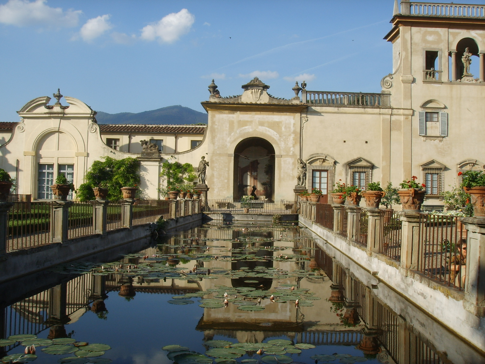 Villa guicciardini corsi salviati, peschiera